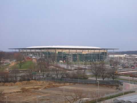 Volkswagen Arena Wolfsburg von der Westseite aus aufgenommen